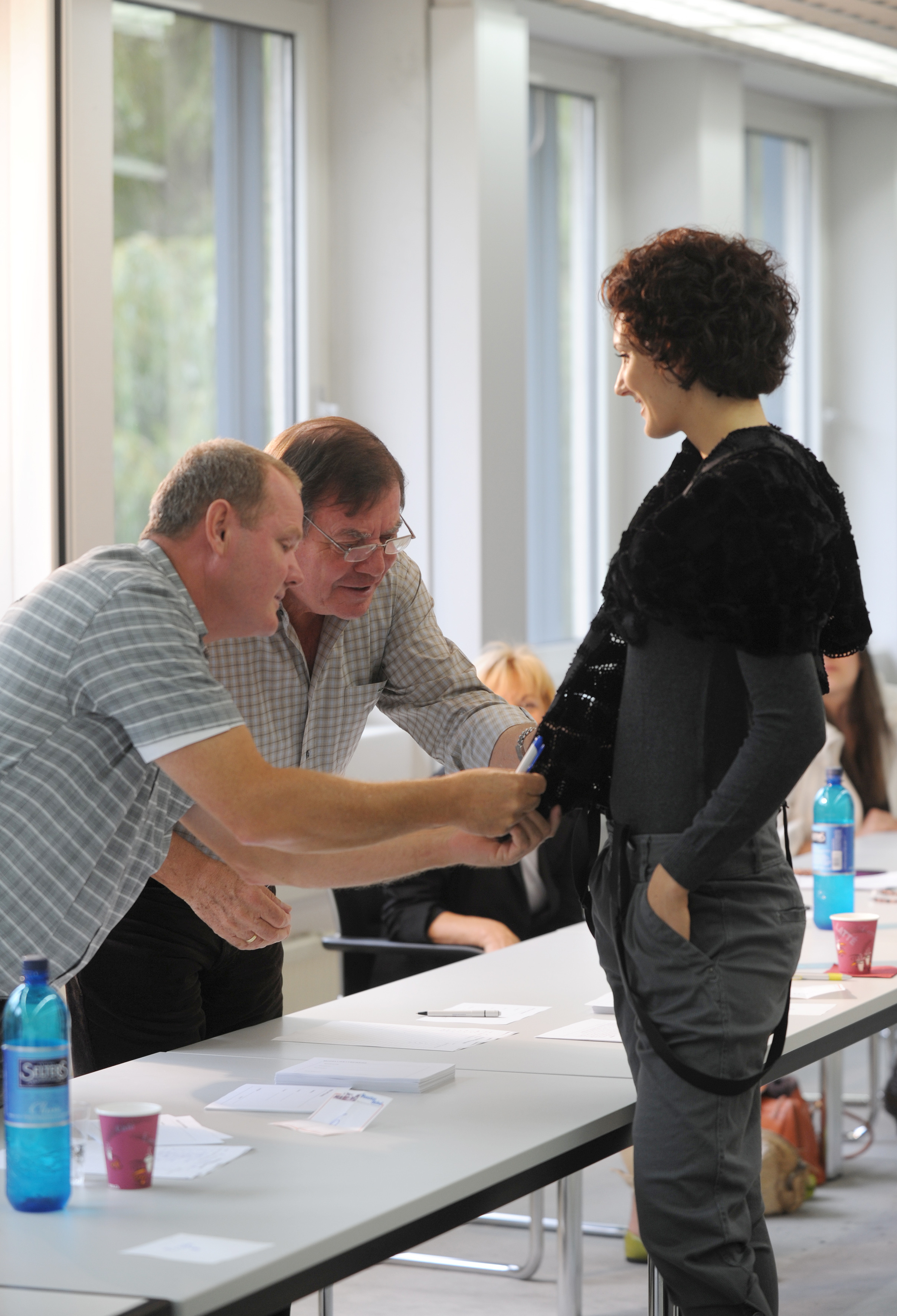 International German Fur Award 2009 des Kürschnerhandwerks. Gruppe "Accessoires". Gruppe A, Free Style, Premium Gold: Pelzwerk Hamburg Stefan Buchmann, Cashmere-Mink-Stola. Innovationspreis, Pelzwerk Hamburg, Stefan Buchmann, Stola Cashmere-Nerz, Mink in Konkav-Konvex-Technik. Pelzmarkt Newsletter 11/09, November 2009, S. 8 Jurymitglieder betrachten die ausgefallene Arbeitstechnik.: Gruppe A, Free Style, Premium Gold: Pelzwerk Hamburg Stefan Buchmann, Cashmere-Mink-Stola. Innovationspreis, Pelzwerk Hamburg, Stefan Buchmann, Stola Cashmere-Nerz, Mink in Konkav-Konvex-Technik. Pelzmarkt Newsletter 11/09, November 2009, S. 8